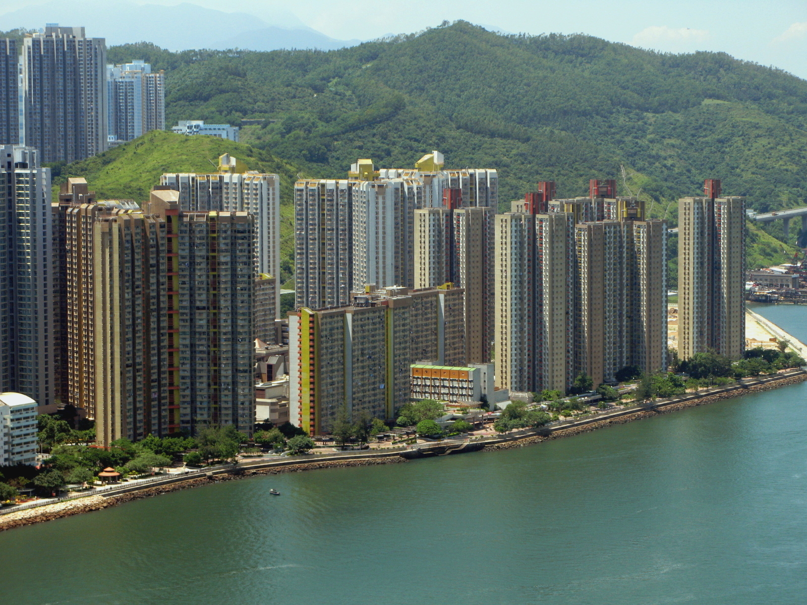 Cheung Fat Estate 長發邨